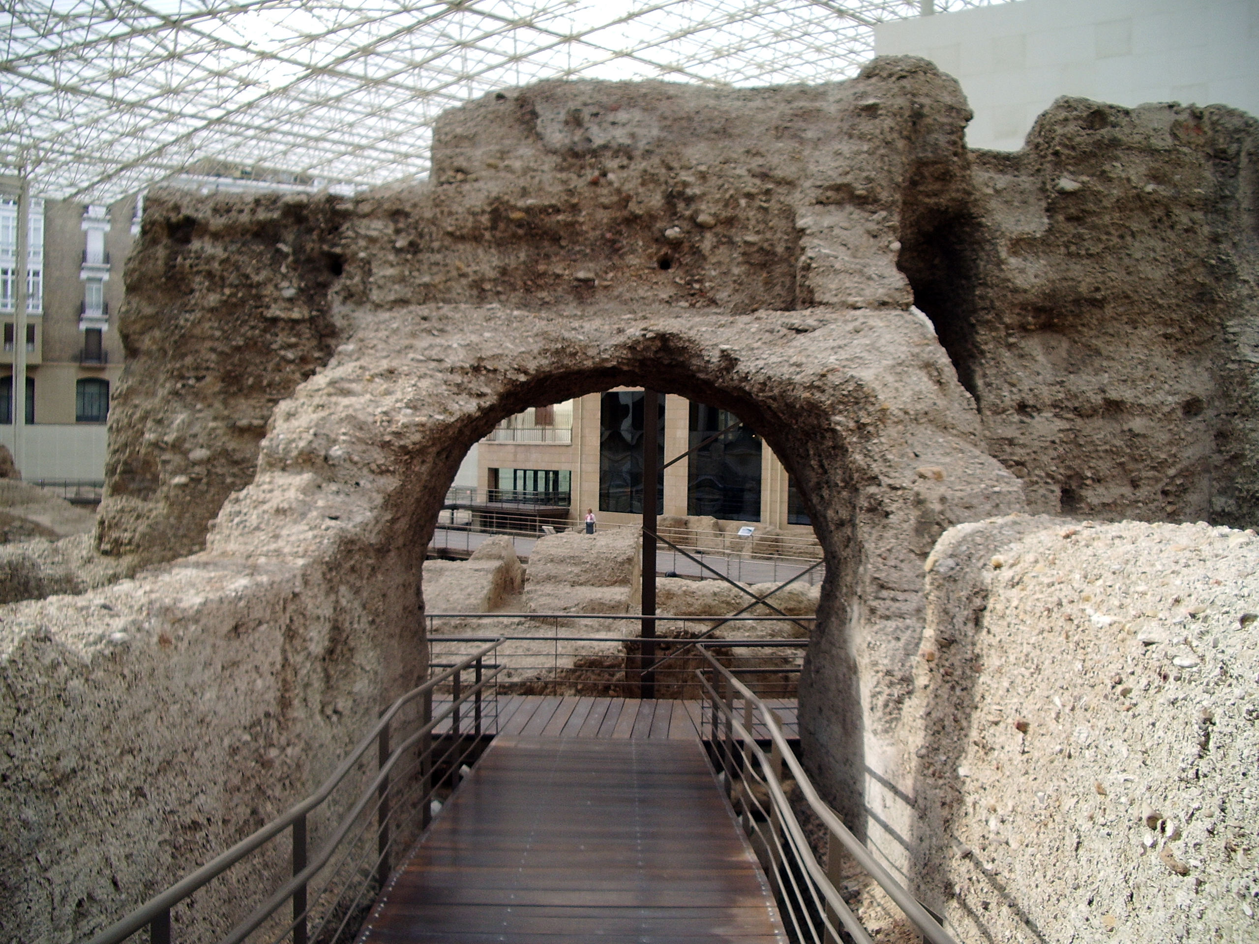 Vomitorio_teatro_romano_de_Cesaraugusta